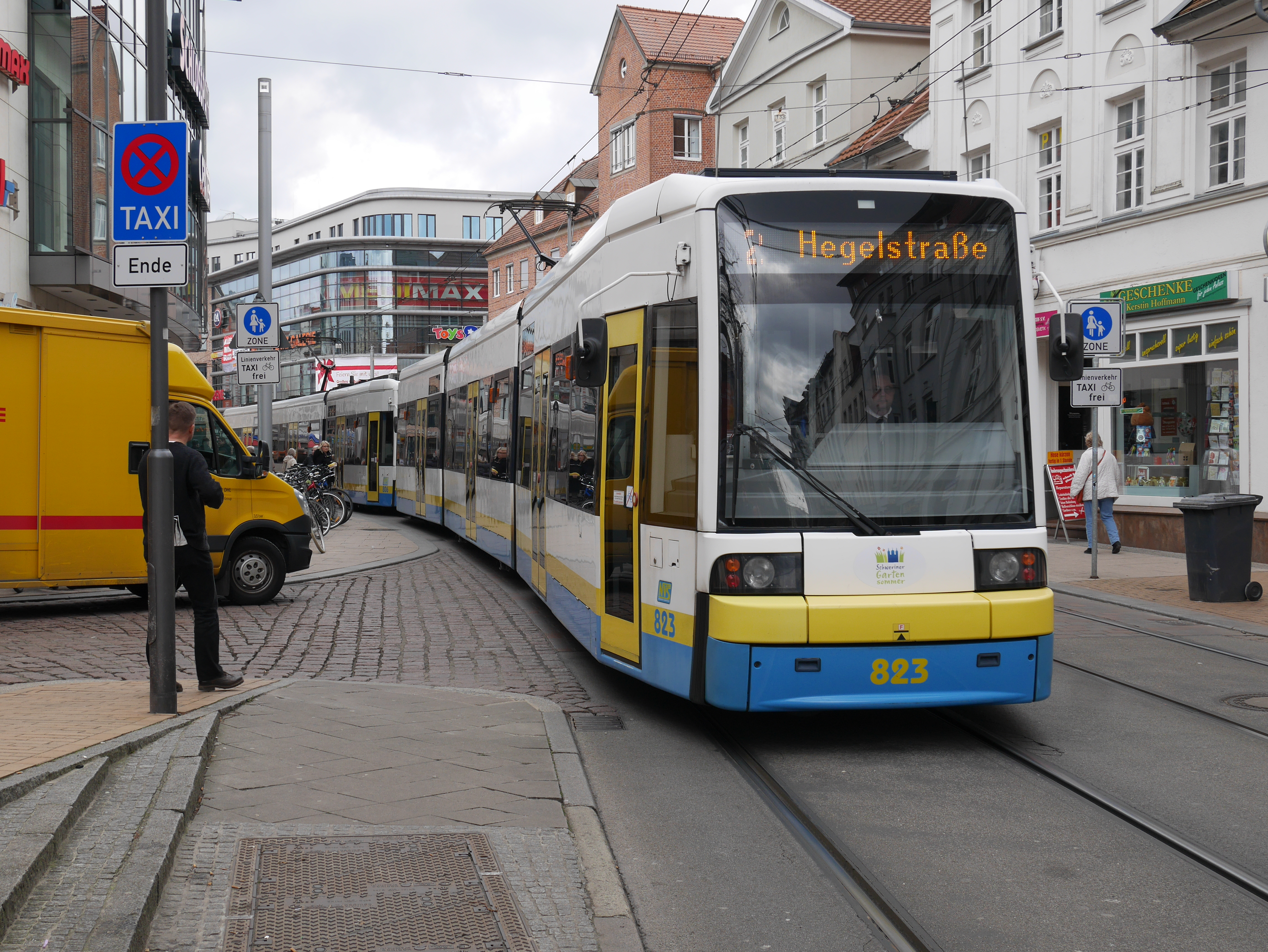 Flexity 823 zwischen Schwerin Marienplatz und Schlossblick.